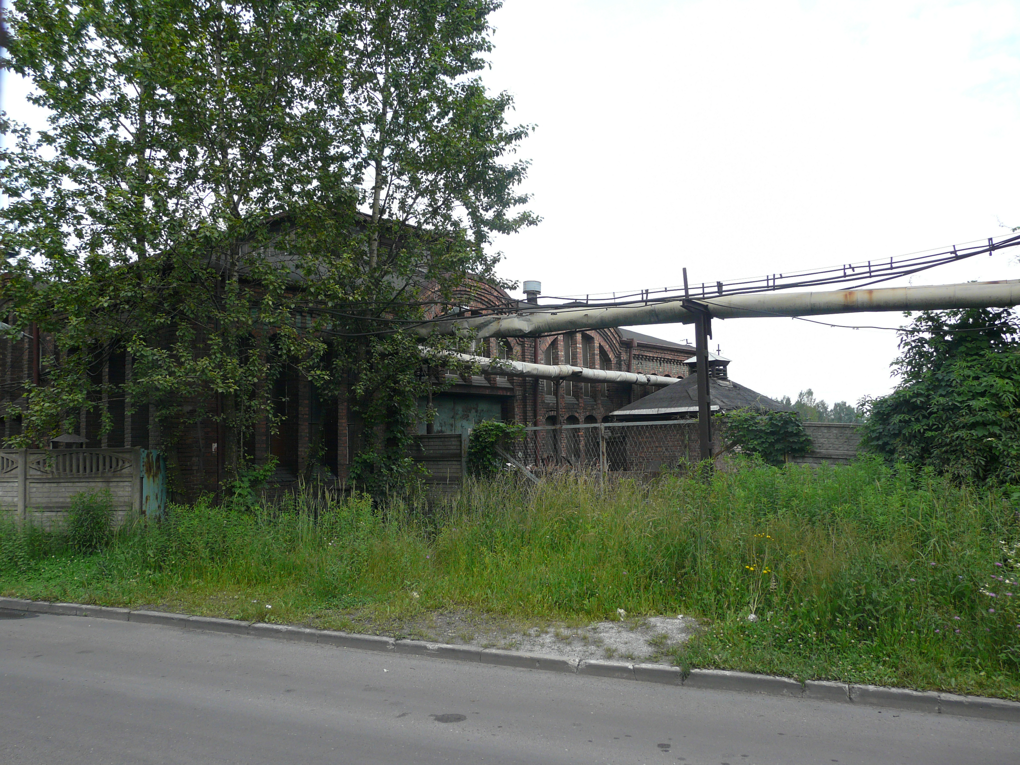 Wieczorek Coal Mine